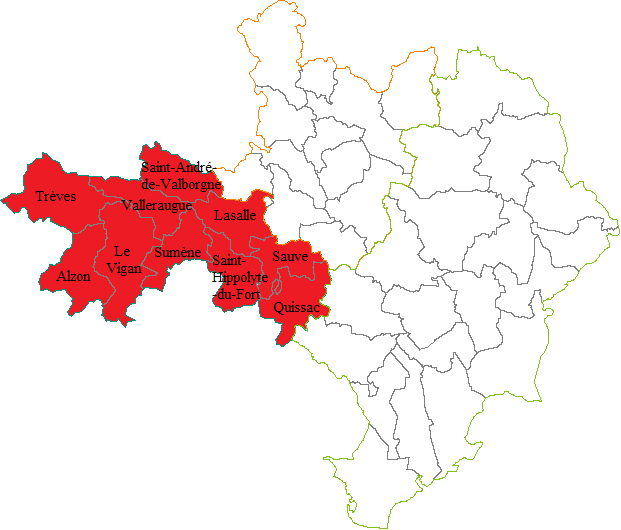 Carte des cantons composant l'arrondissement du Vigan (Gard)